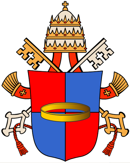 Dëst Bild weist d'Wope vum Poopst Urban III. Ze bemierken ass, datt d'Bild sech un Duerstellungen orientéiert, déi zum deel onkloer an ongenee sinn (gréisstendeels Fresken aus der Zäit vum Personage)